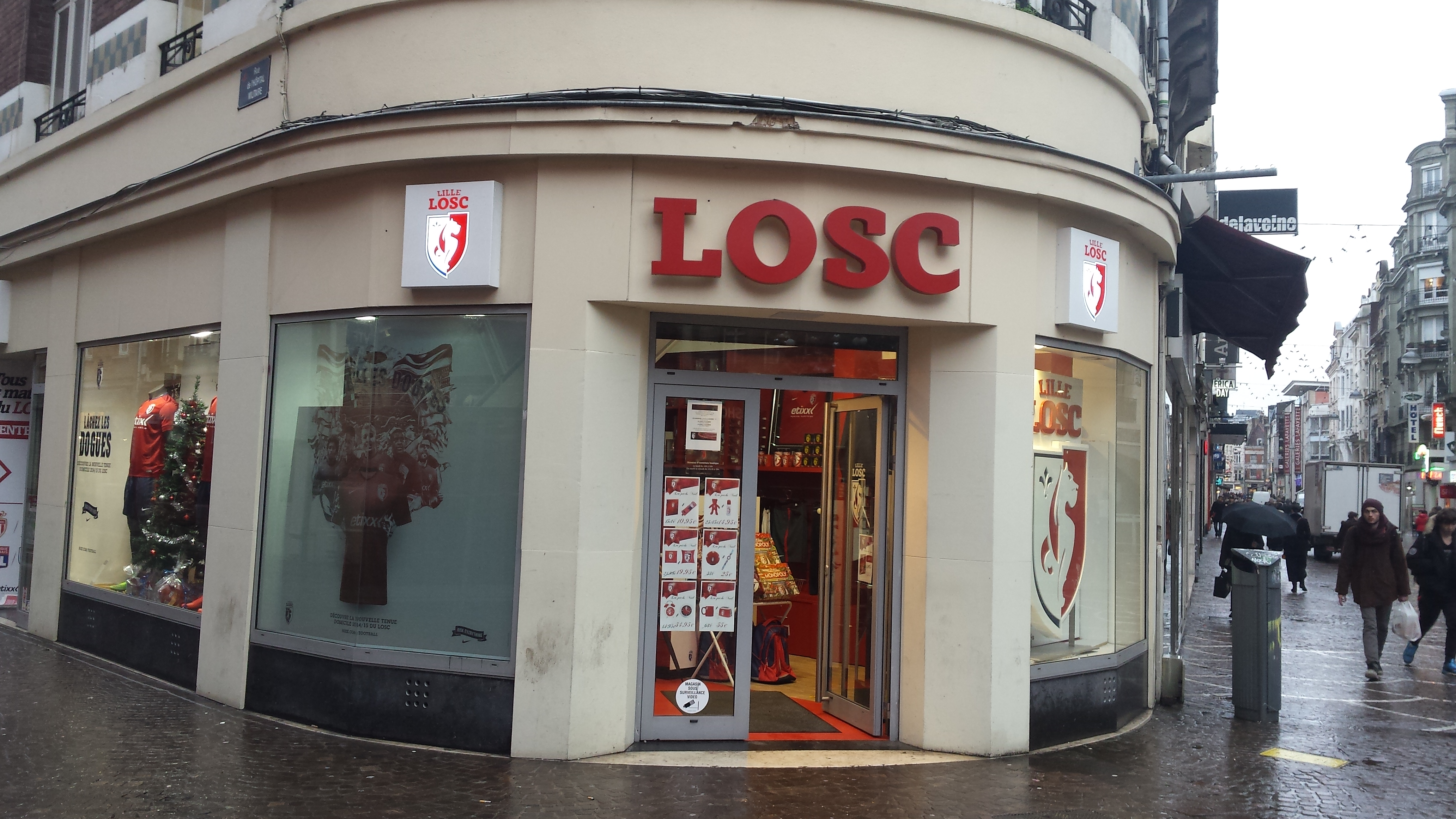 Boutique du club de football du Lille LOSC basé à Lille